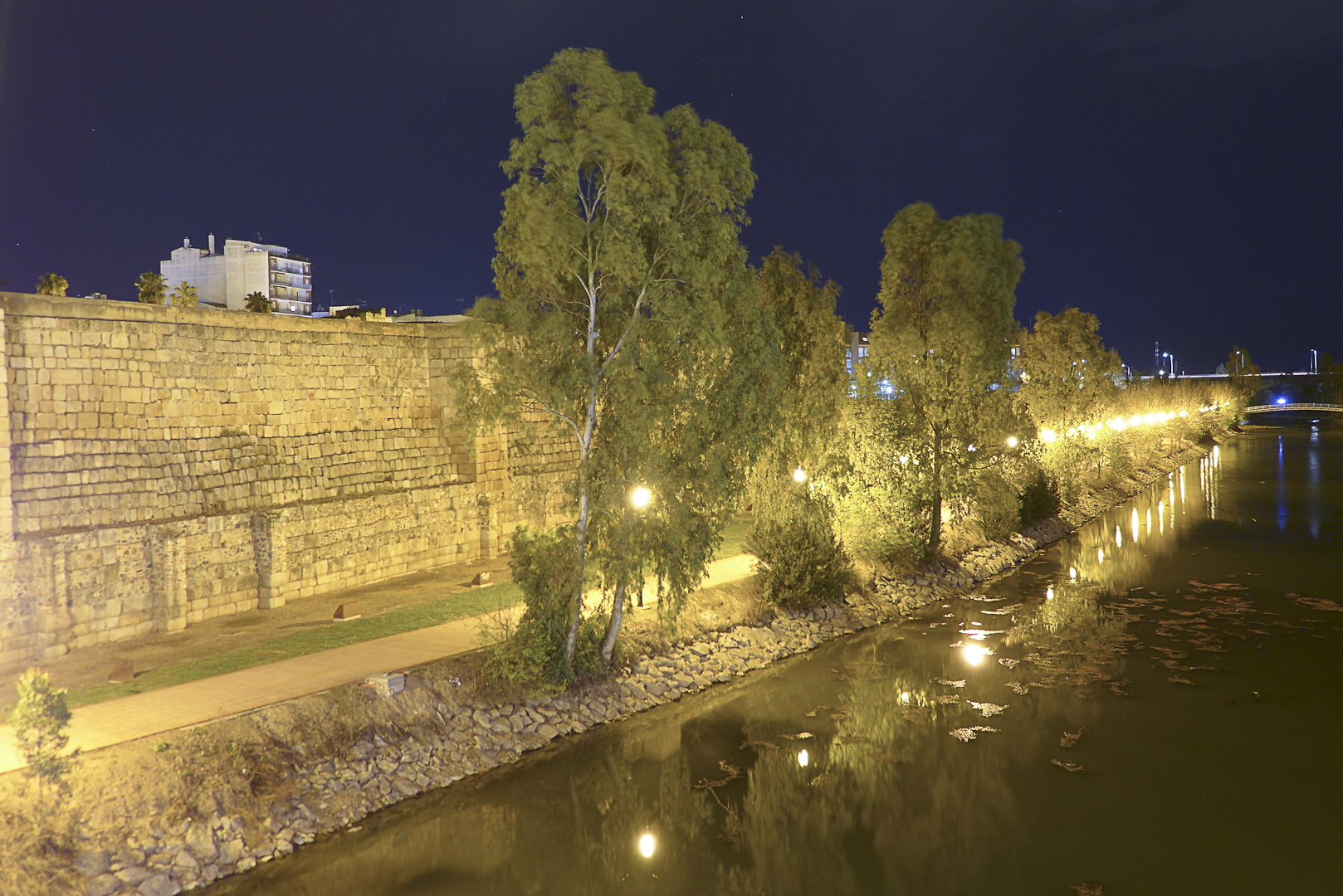 Spain-Merida-Spain-Merida-Puente Romano-P1170583